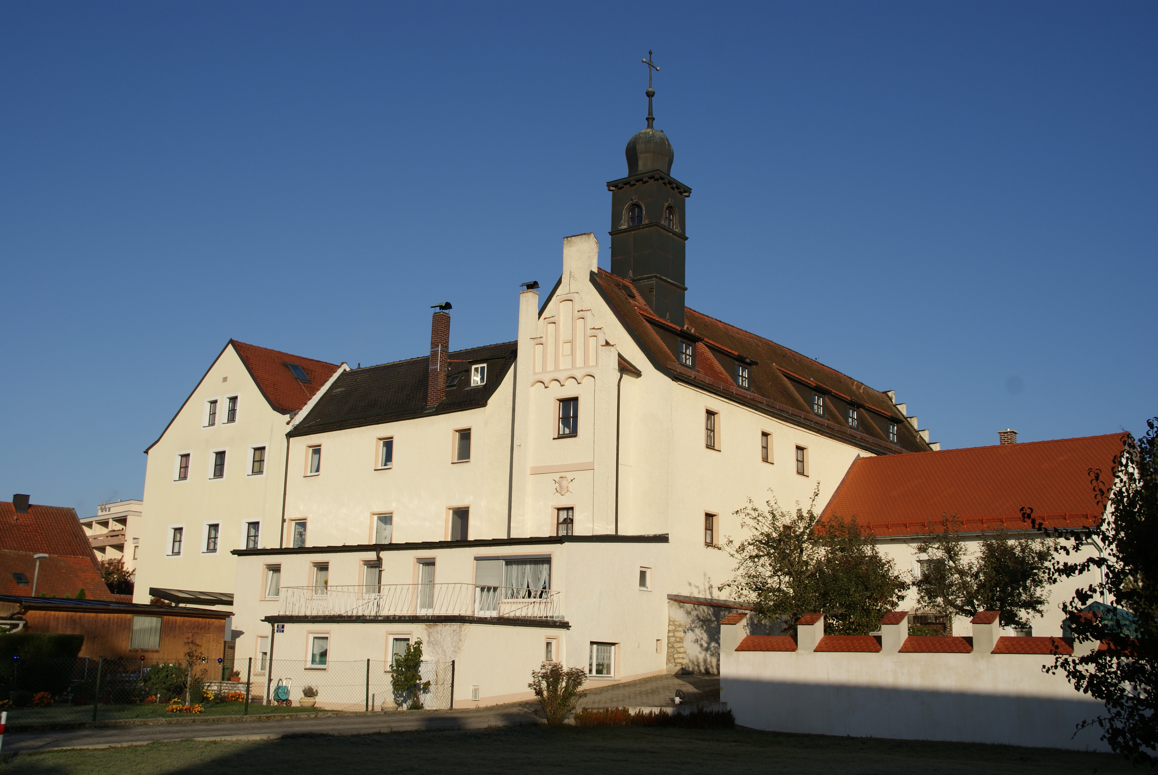 Schloss Weichs im gleichnamigen Stadtbezirk Regensburgs, spätgotische Vierflügelanlage, Renai